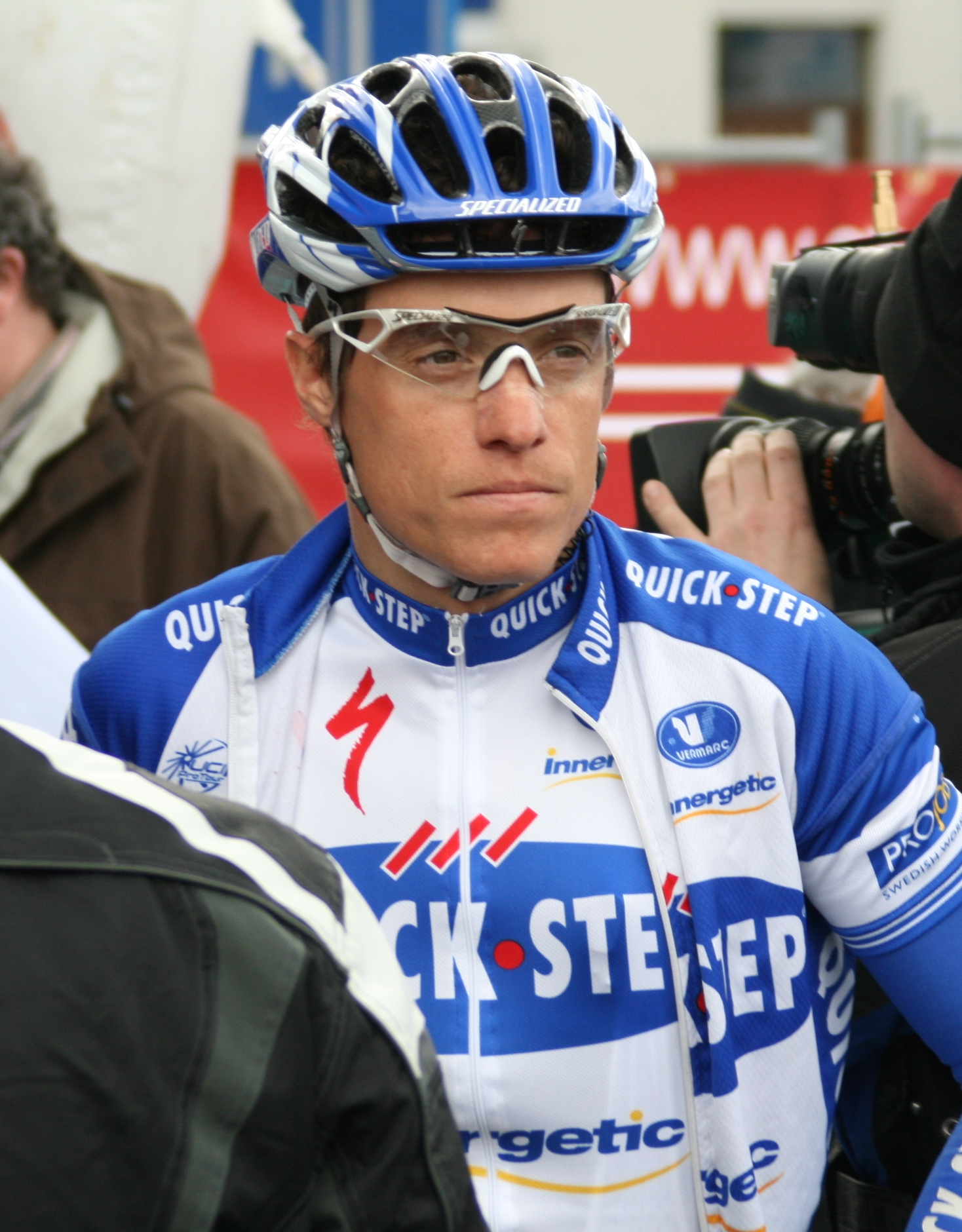 Sylvain Chavanel, au Grand Prix E3 2009